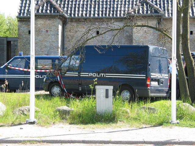 materielvogn fra københavns politi